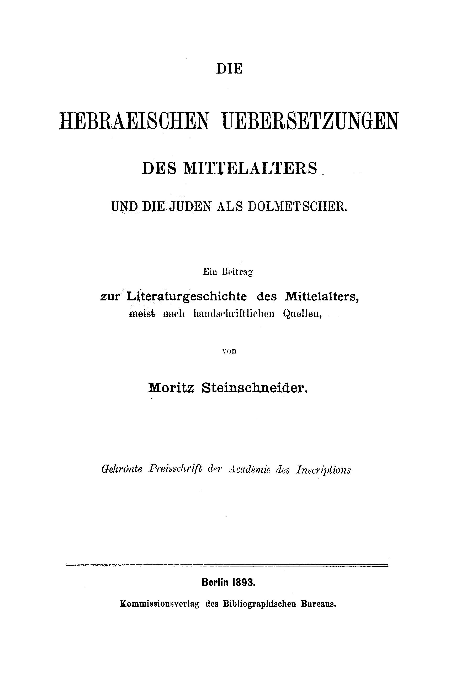 Front page of Moritz Steinschneider's "Die Hebräischen Übersetzungen des Mittelalters und die Juden als Dolmetscher", Berlin, 1893